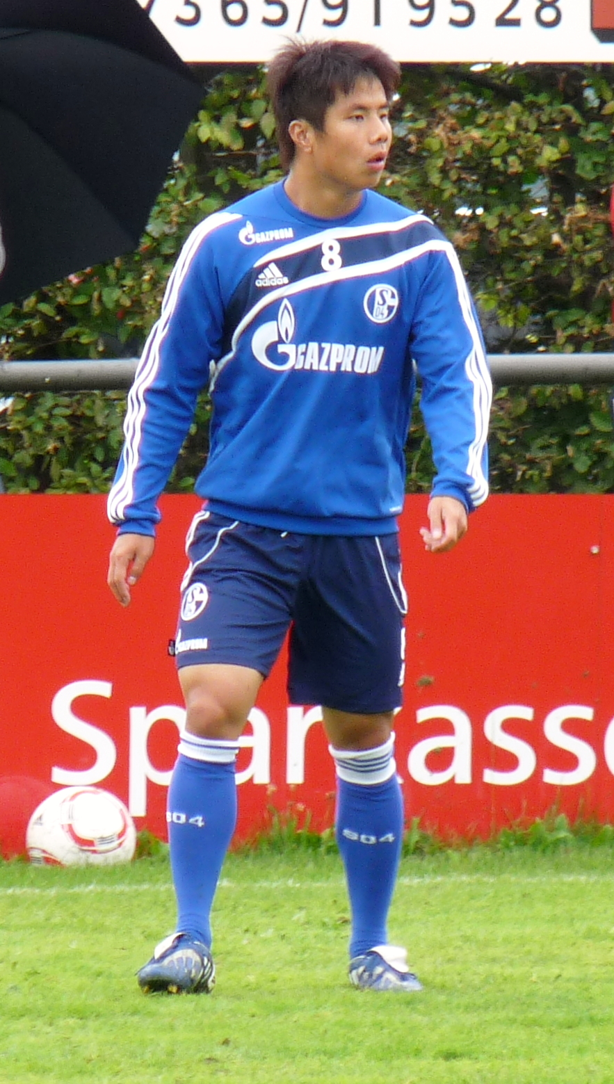 Hao Junmin